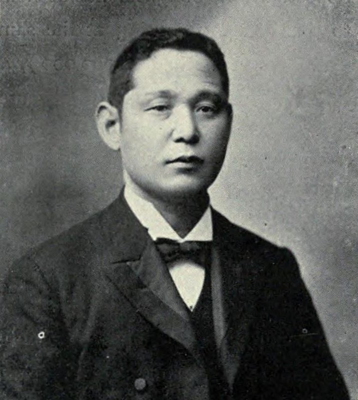 村上太三郎 静岡県出身の相場師・実業家・衆議院議員。兜町で飛将軍と称された入丸商店主。日露戦争時代は鈴木久五郎と並び称された成金組の１人。